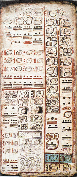 Dresden Codex, page 58